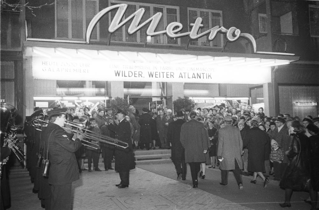 im Kino Metro im Schlosshof in der Holtenauer Straße 162-170. Im Bild links spielt ein Musikkorps der Bundesmarine.